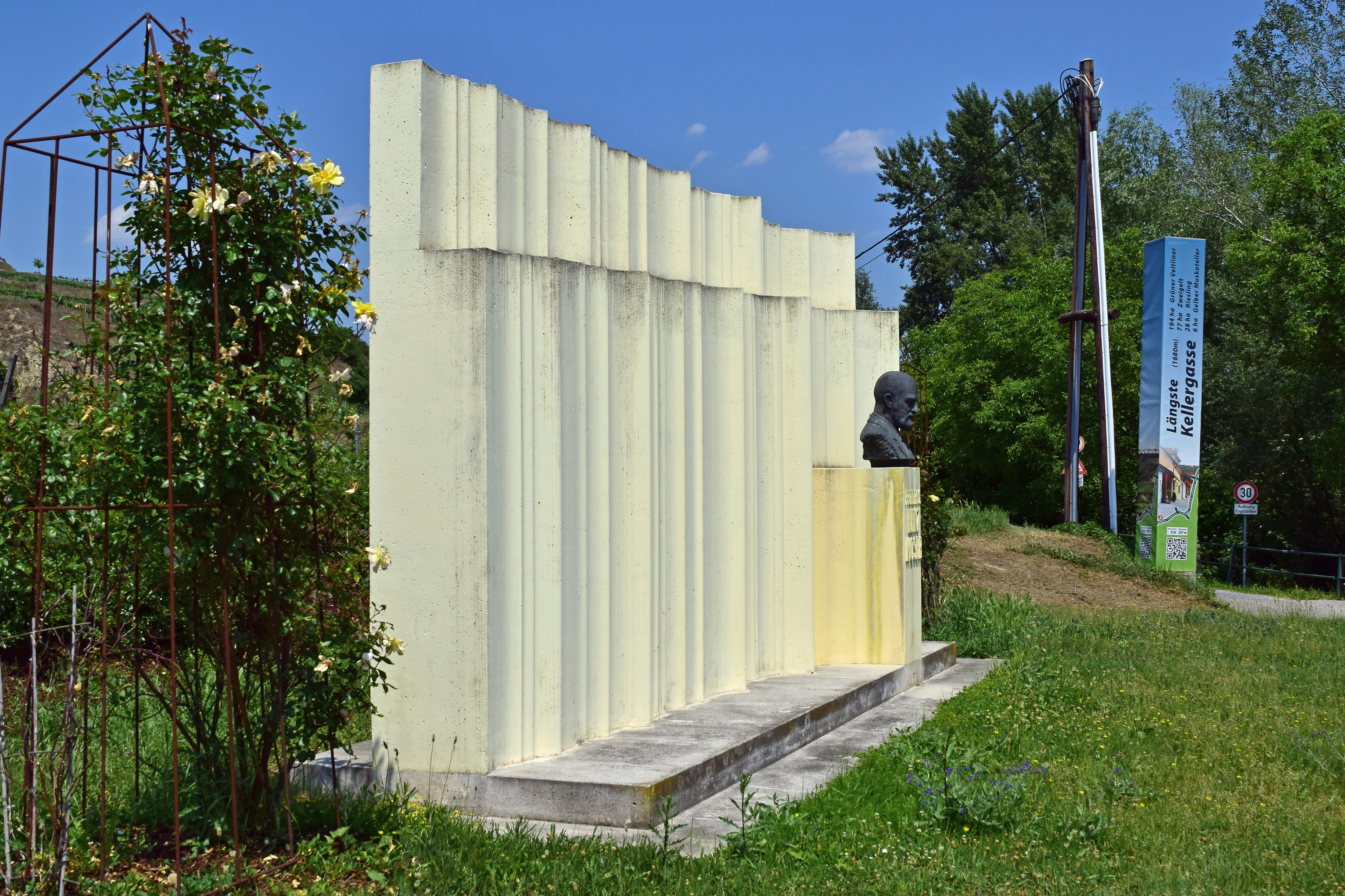 Das Lenz-Moser-Denkmal steht am Beginn der Kellergasse Lindobelgasse in Rohrendorf bei Krems, welche die längste Kellergasse Österreichs ist.[1]